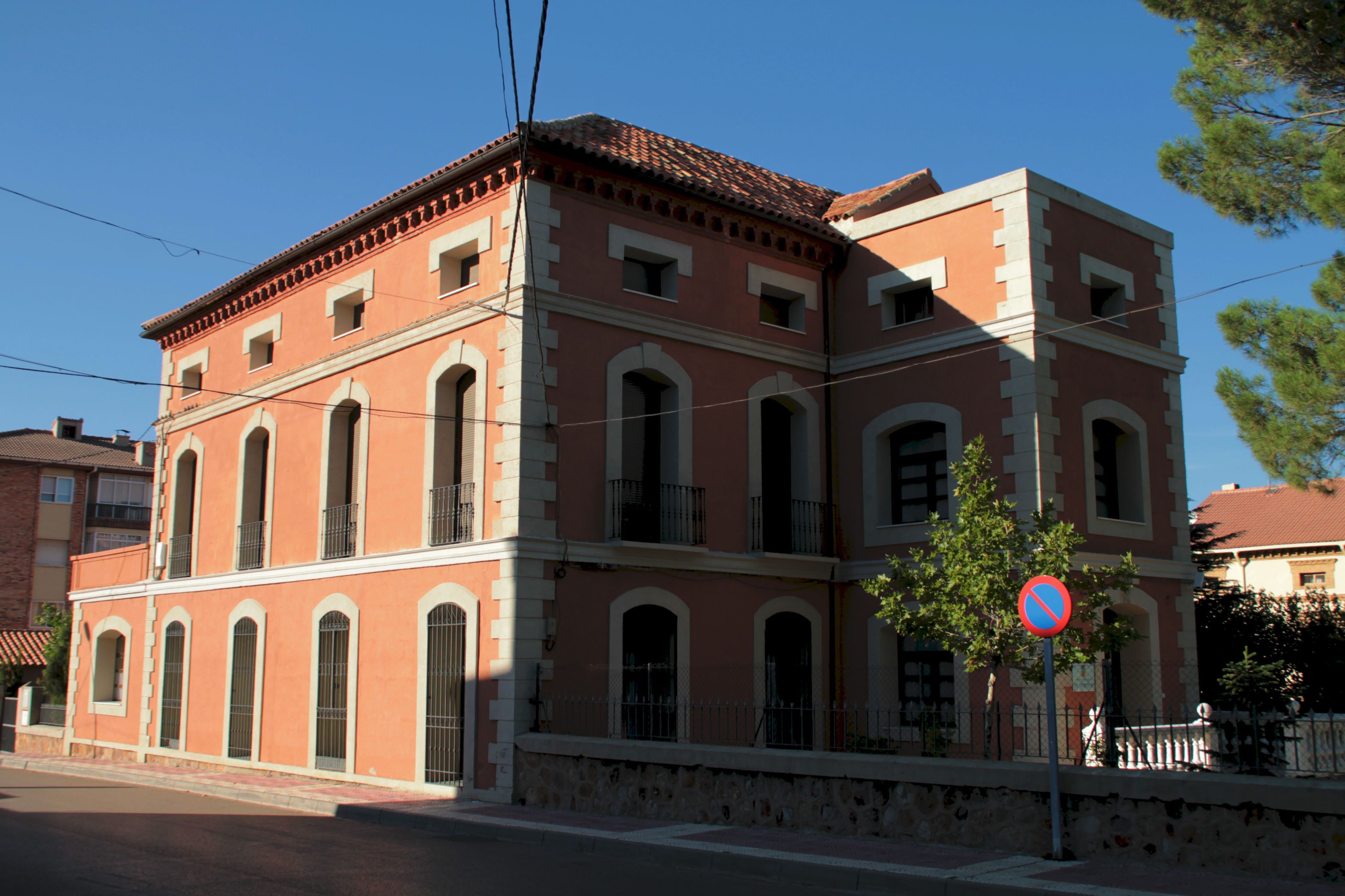 Antiguas oficinas de Minas y Ferrocarriles de Utrillas.